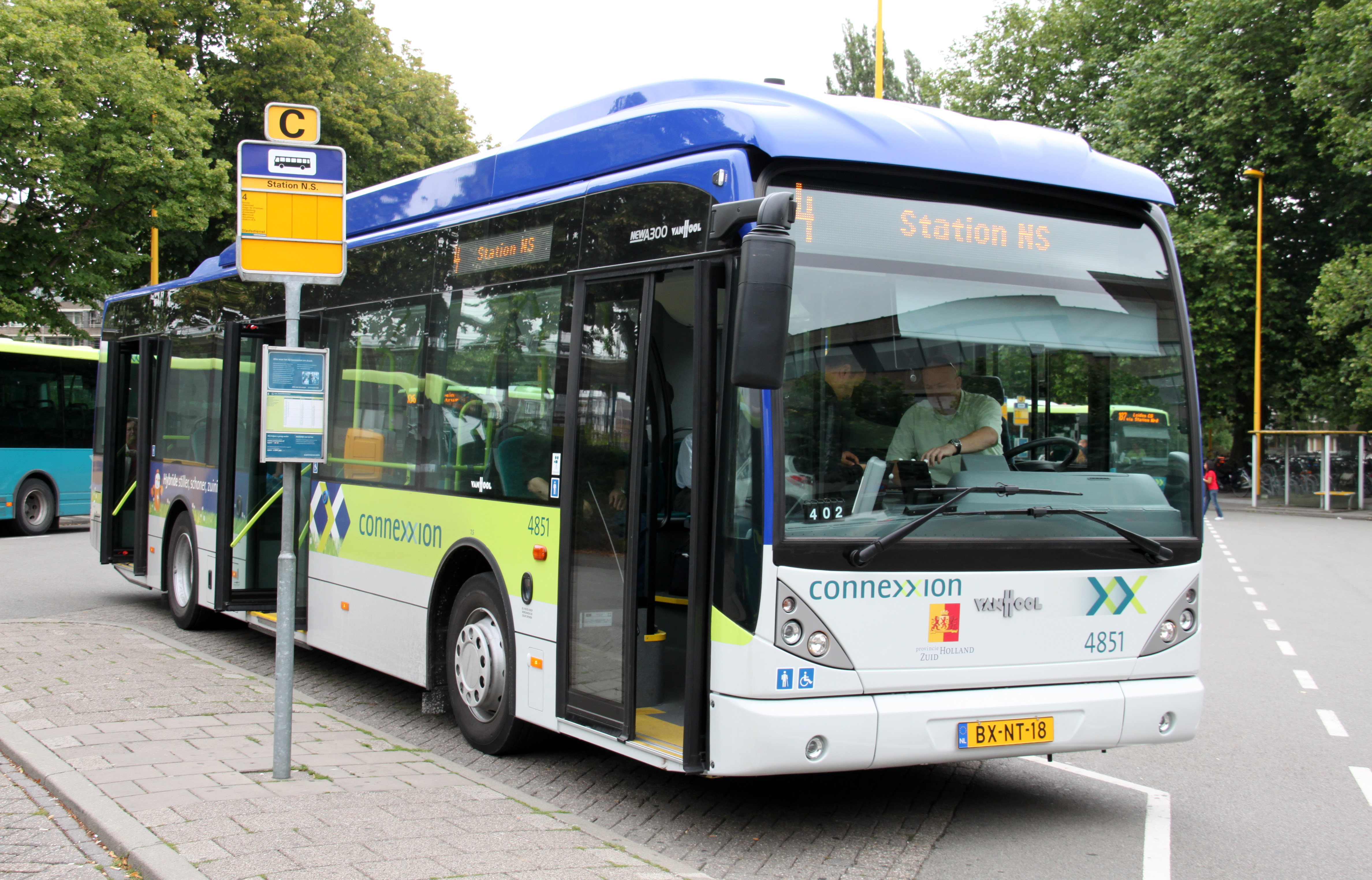 Een hybride bus van Van Hool op de stadsdienst van Gouda. De provincie Zuid-Holland is de opdrachtgever van het openbaar vervoer in deze regio.